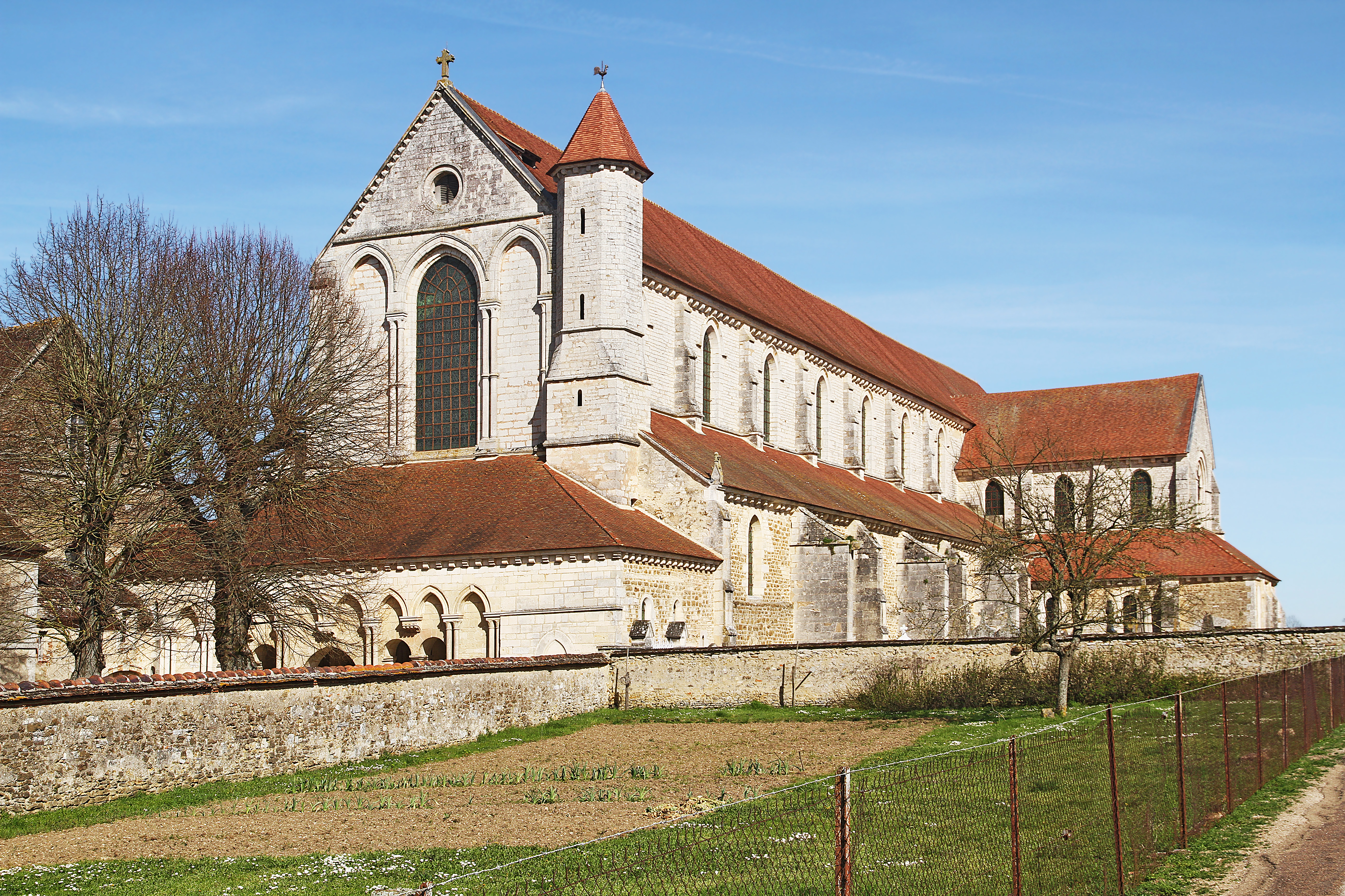 Potager et abbatiale de Pontigny